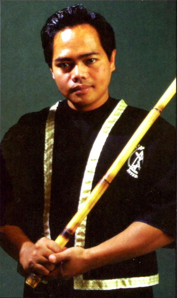 PG Sulite